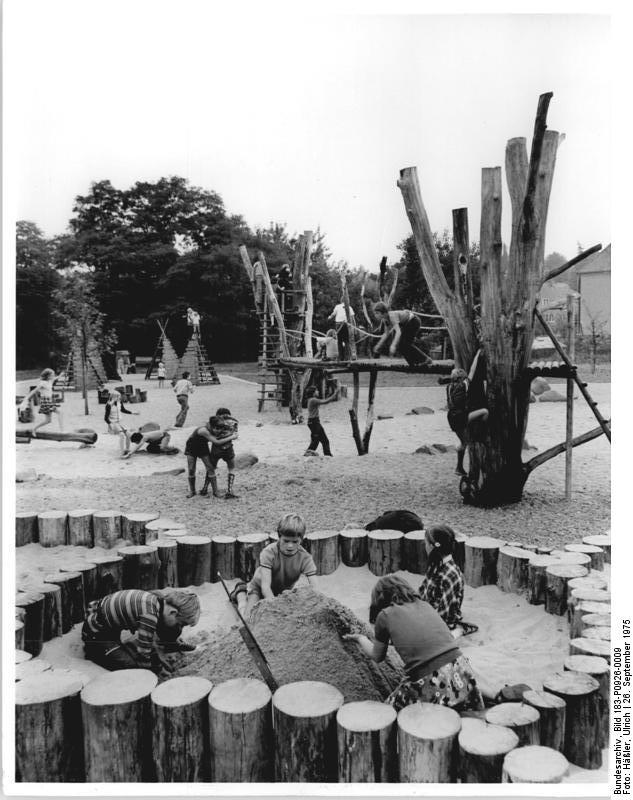 Dresden, Abenteuerspielplatz ADN-ZB Häßler 26.9.1975 Dresden: Von ihrem neuen, schönen Abenteuerspielplatz schon Besitz ergriffen haben die Kinder des Wohnbezirks 111 der Elbestadt, obwohl die offizielle Einweihung erst am 27.9.1975 stattfindet. An diesem Tage, kurz vor dem 26. Jahrestag der DDR, können die Bürger von Dresden-Bühlau eine stolze Bilanz ziehen: In wenigen Monaten errichteten sie an der Stelle eines illegalen Müllabladeplatzes, einem Schandfleck des Wohngebiets, dieses originelle "Mach-mit!"-Objekt und schufen damit ohne staatliche finanzielle Zuschüsse einen Wert von über 120000 Mark. Das Projekt verwirklichten 300 Bürger unter Anleitung eines Gartenarchitekten gemeinsam mit dem Partnerbetrieb des Wohnbezirks, dem VEB Maschinenbauhandel. Bis zum IX. Parteitag der SED wollen die Bühlauer den Spielplatz noch um eine Rollschuhbahn erweitern.